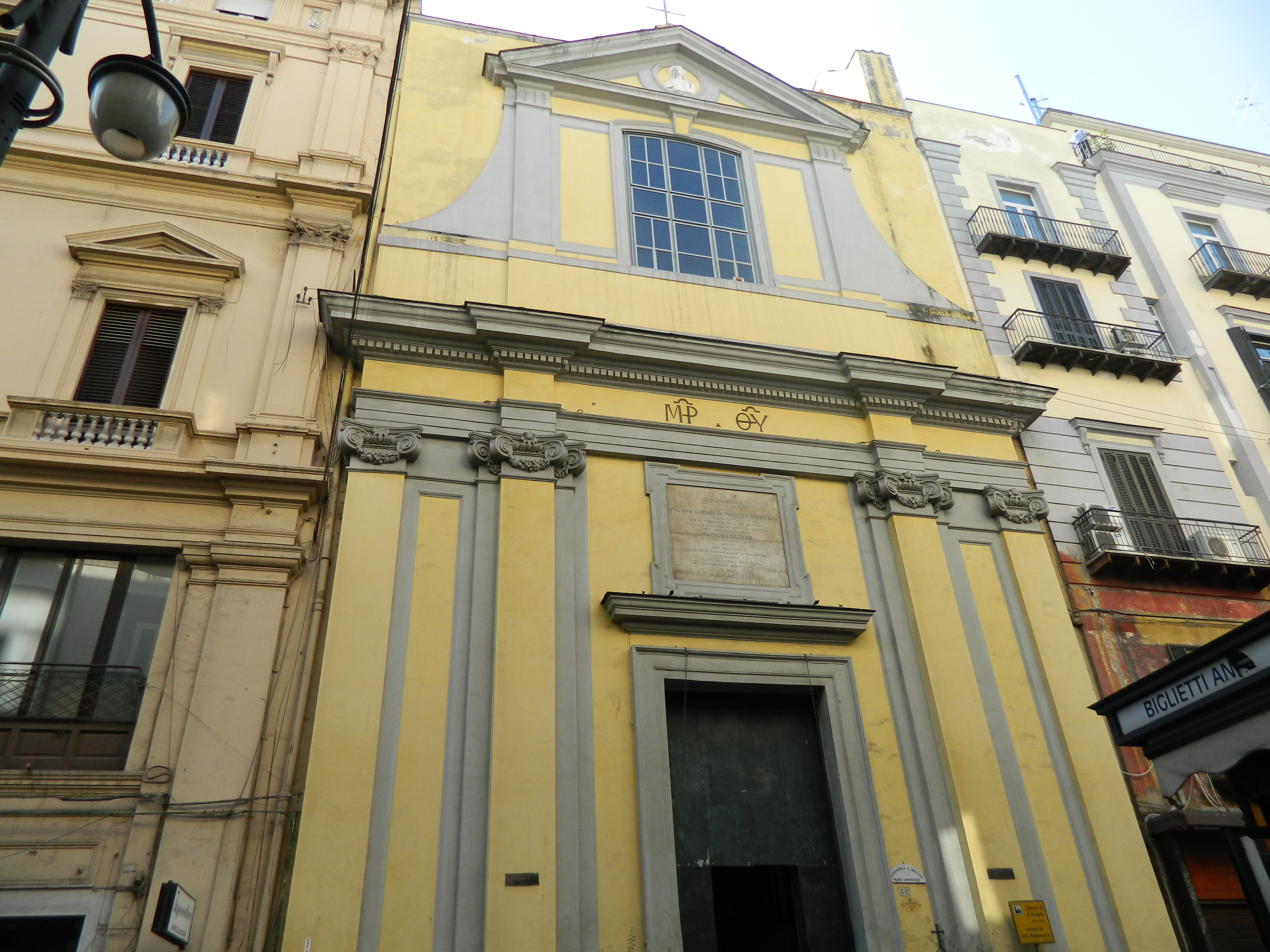 Chiesa di Santa Brigida (Napoli) - Facciata